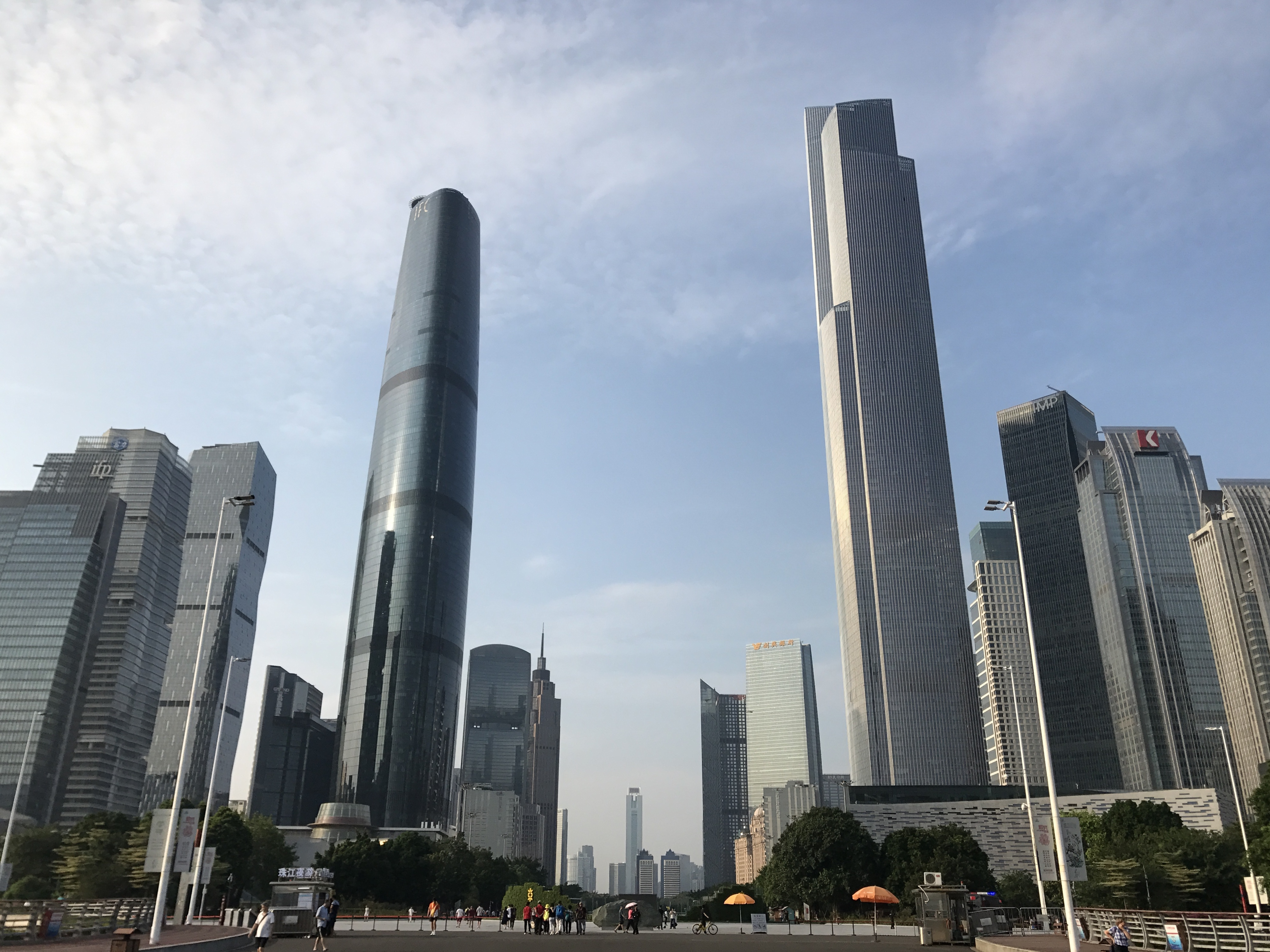 海心沙島側より望む花城広場